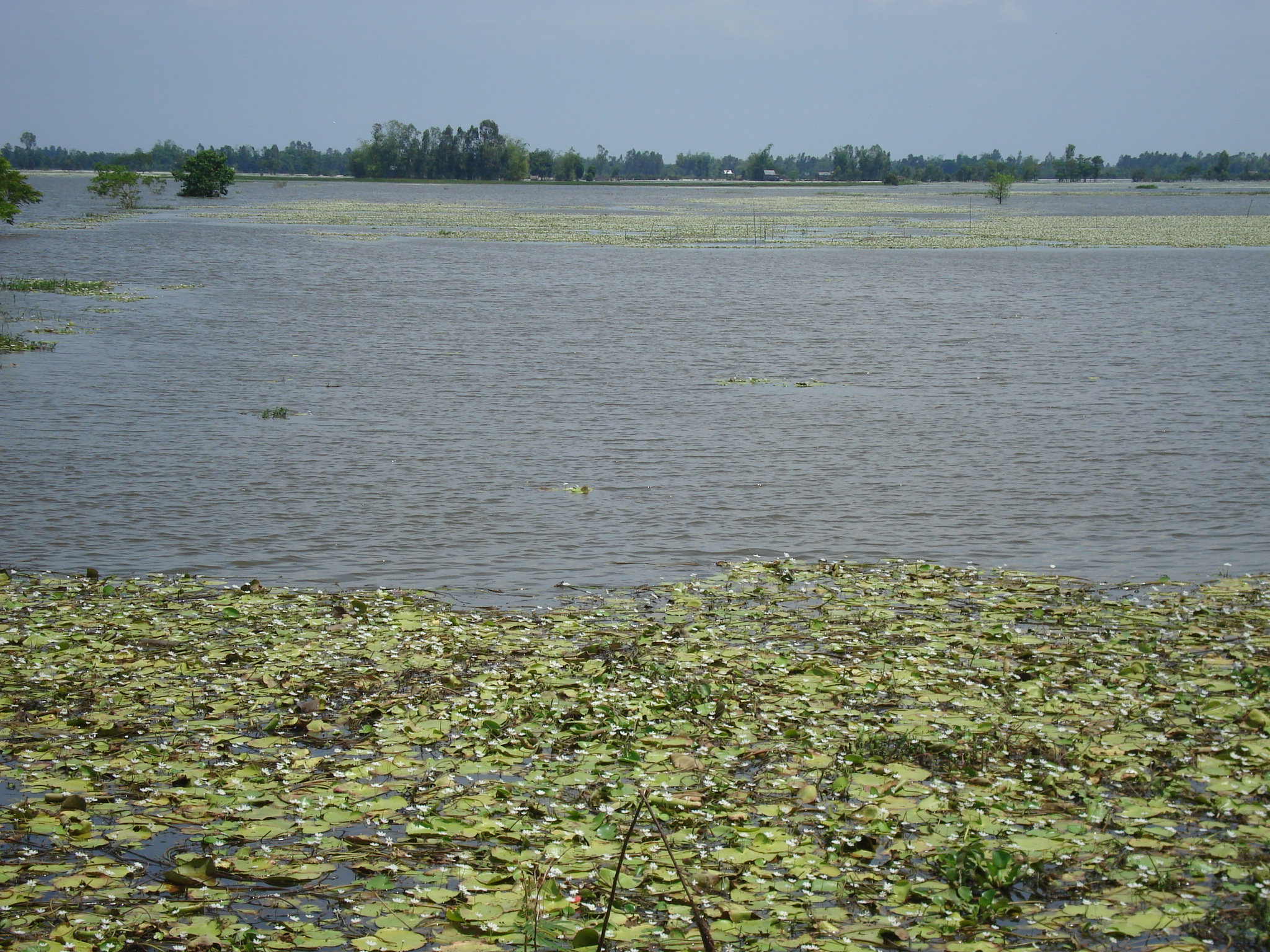 le territoire de Gao Giong est complètement recouvert d'eau lors de la grande crue de septembre